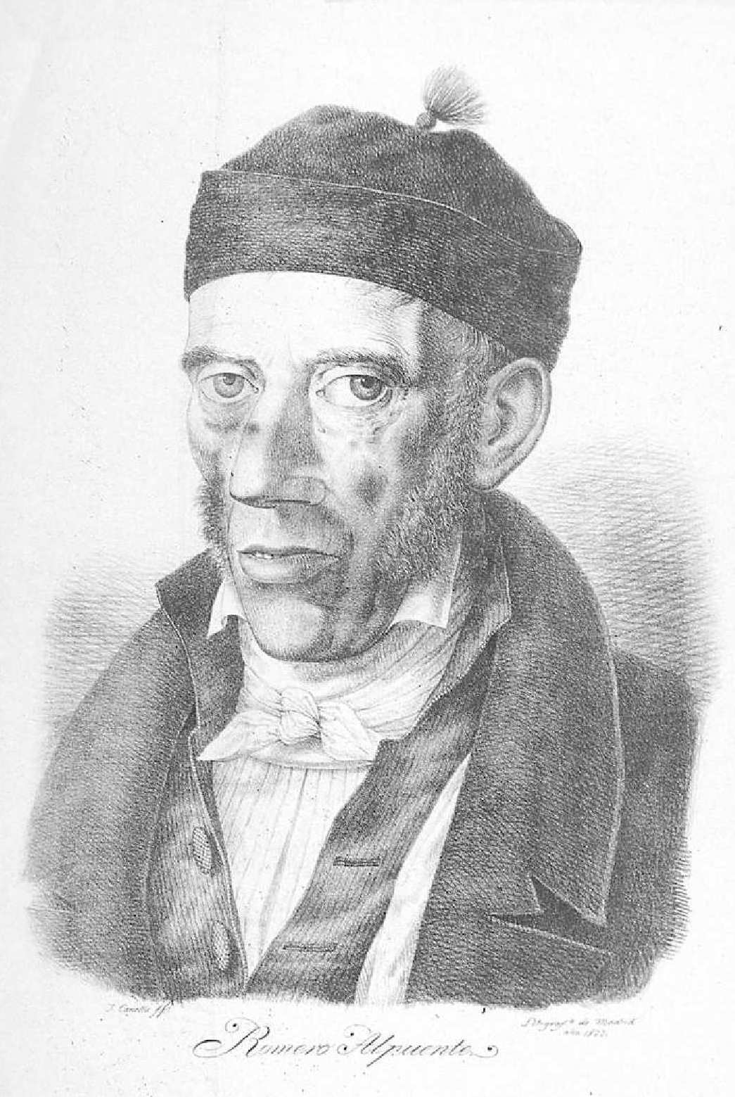 Juan Romero Alpuente, litografía de José Canella. 1822. Biblioteca Nacional de España